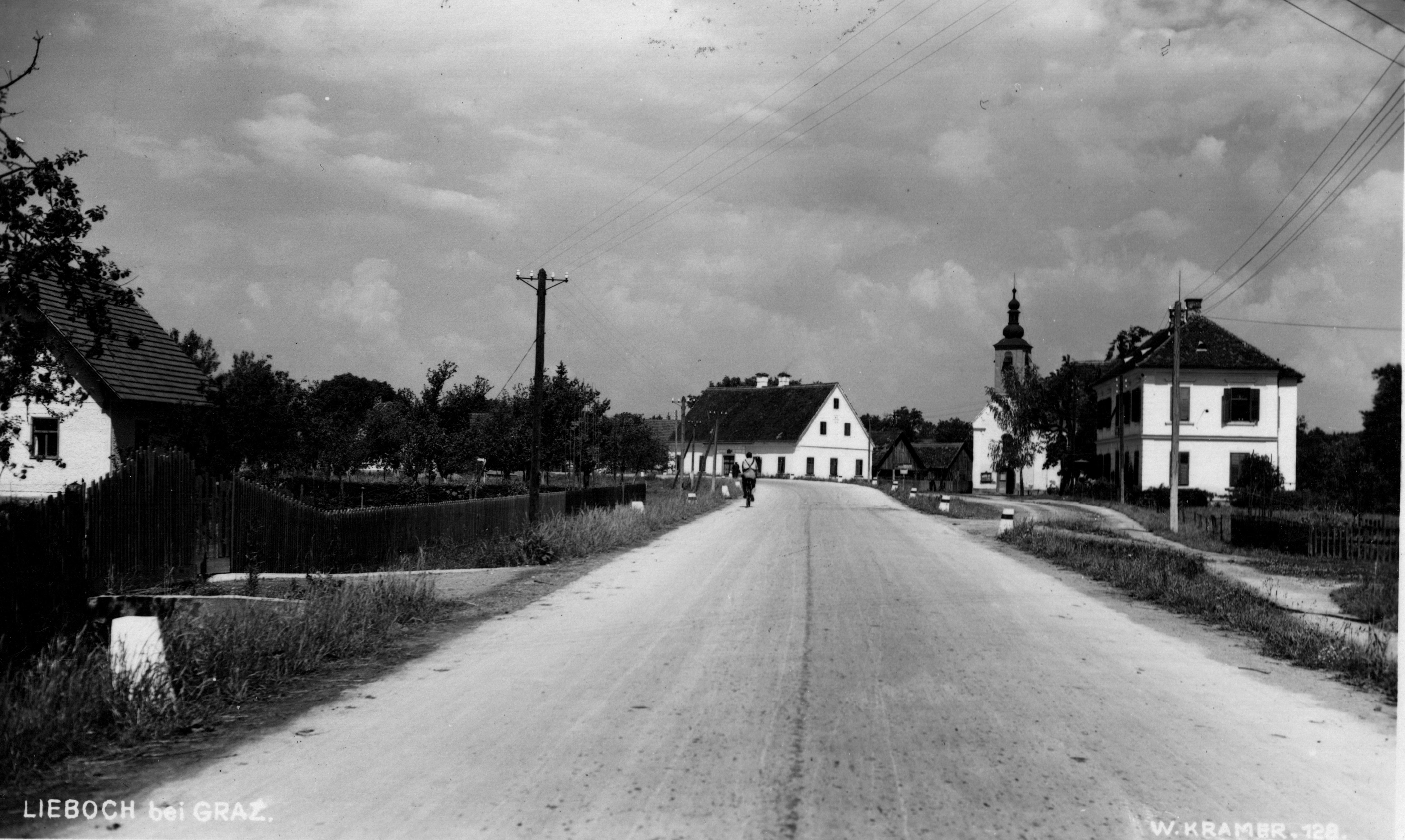 Packerstraße, Ortskern von Lieboch mit alter Kirche im Hintergrund